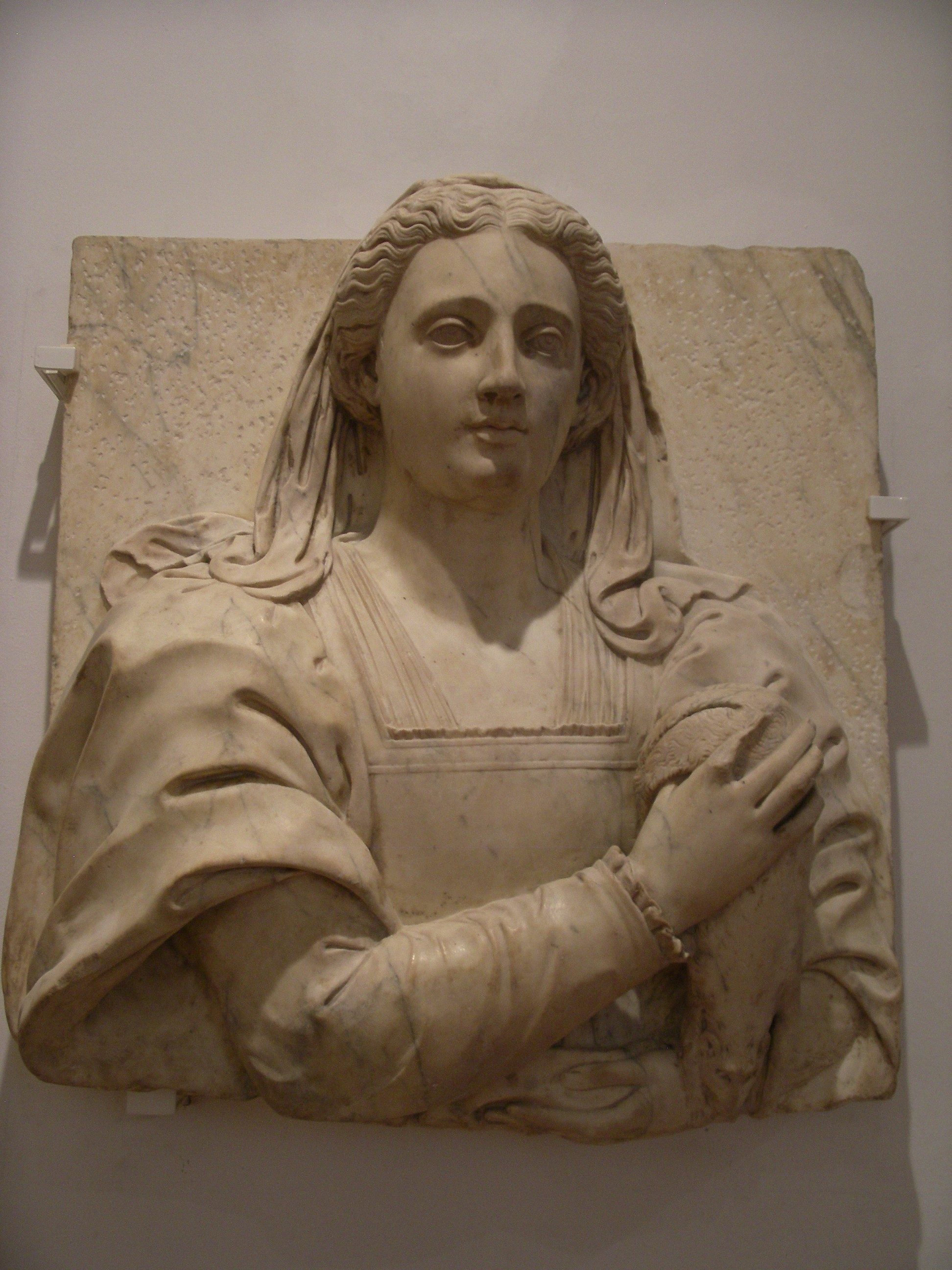 Bust per Martí Díaz de Liatzasolo, s. XVI (Museu Marès, Barelona)